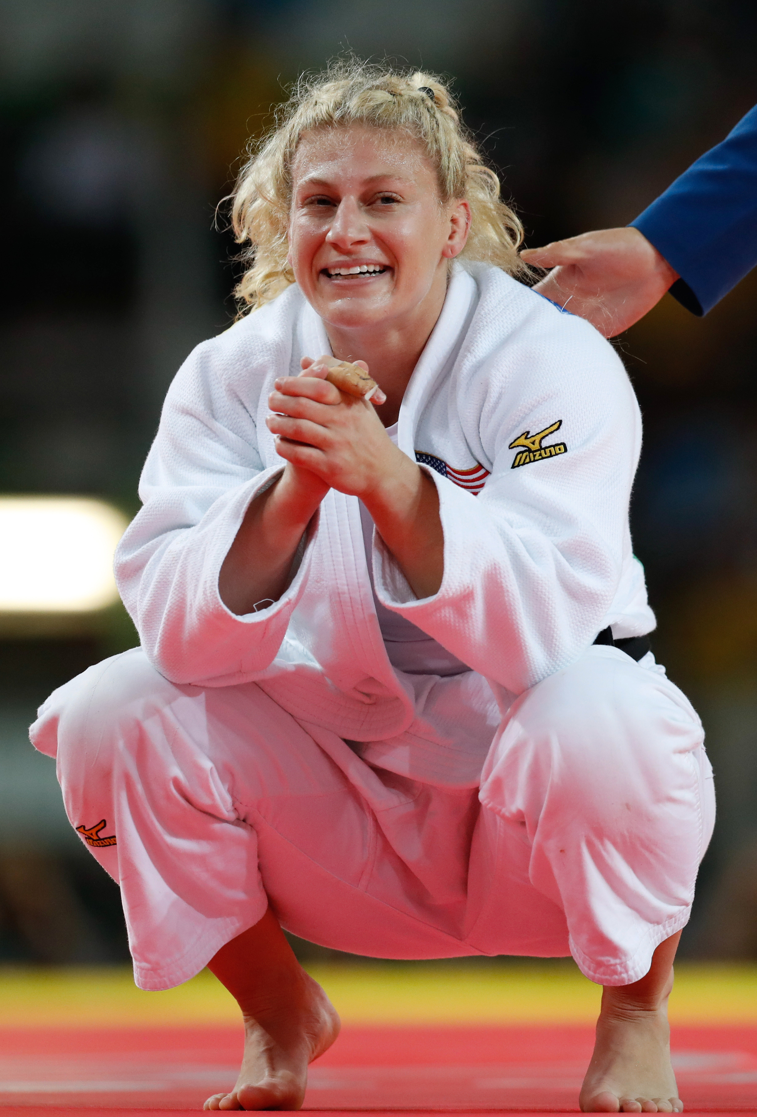 Rio de Janeiro - A judoca norte-americana Kayla Harrison vence a francesa Audrey Tcheumeo na categoria até 78 quilos e ganha medalha de ouro na Rio 2016 (Fernando Frazão/Agência Brasil)